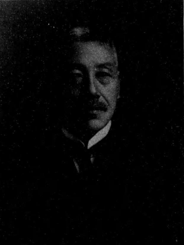 堀 啓次郎